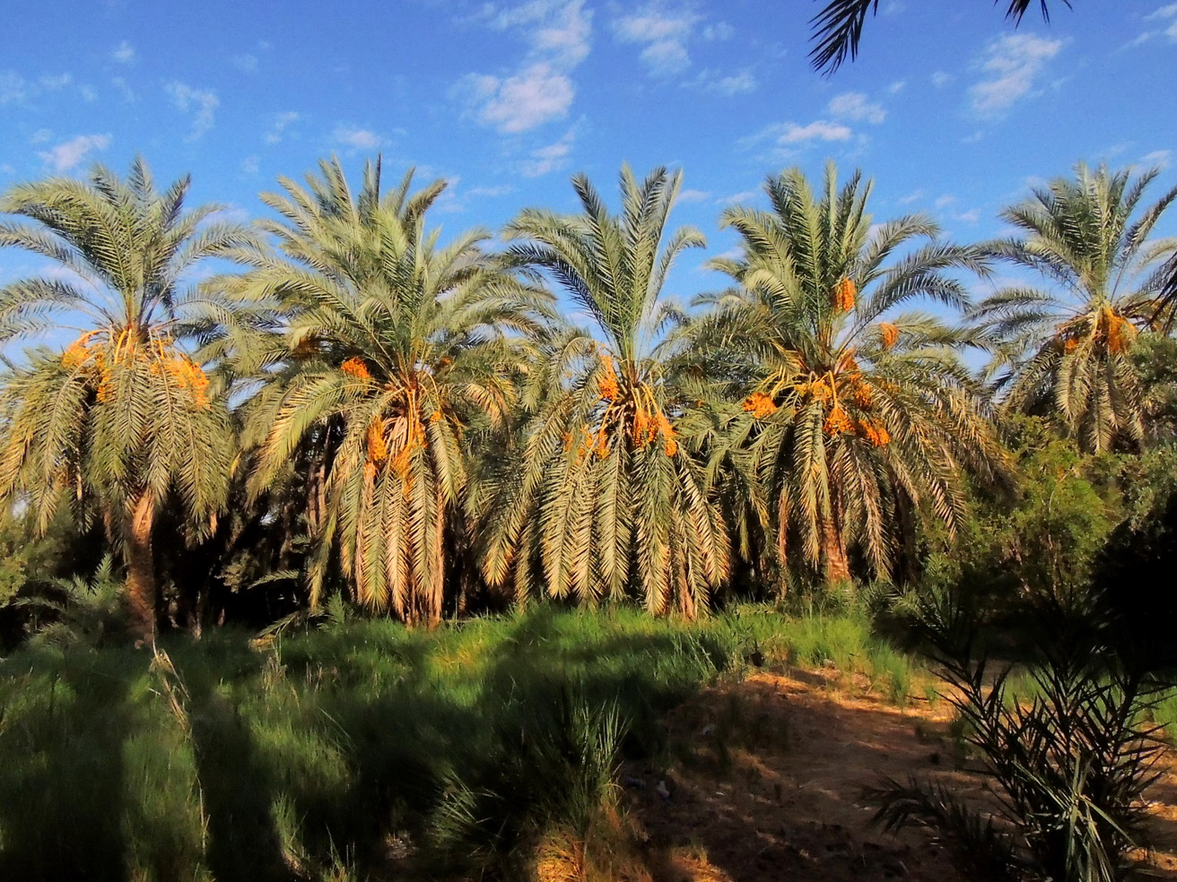 le jardin des dattes d'Abo elkasem elwahi